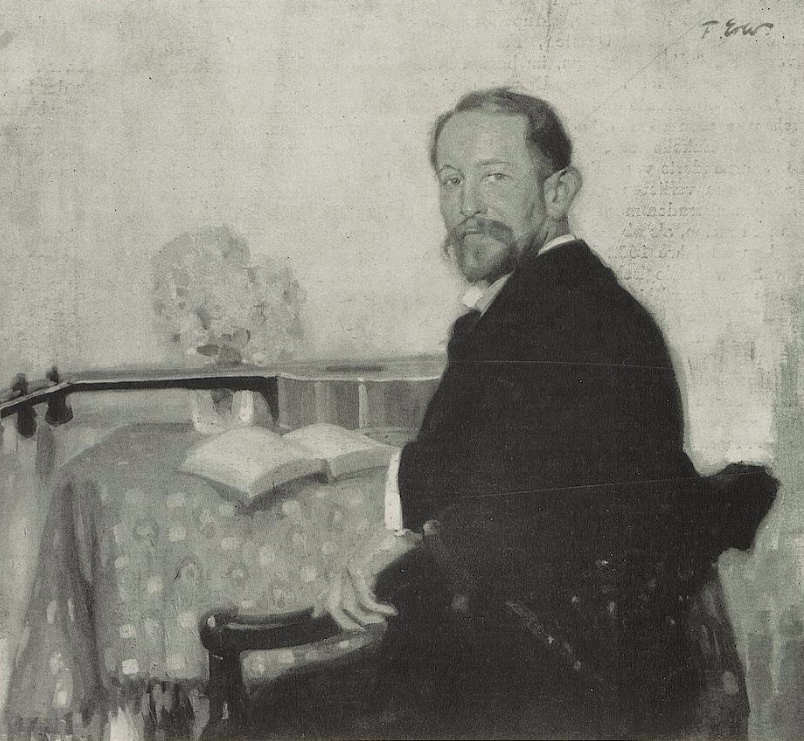 Fritz Erler - Porträt Franz Langheinrich